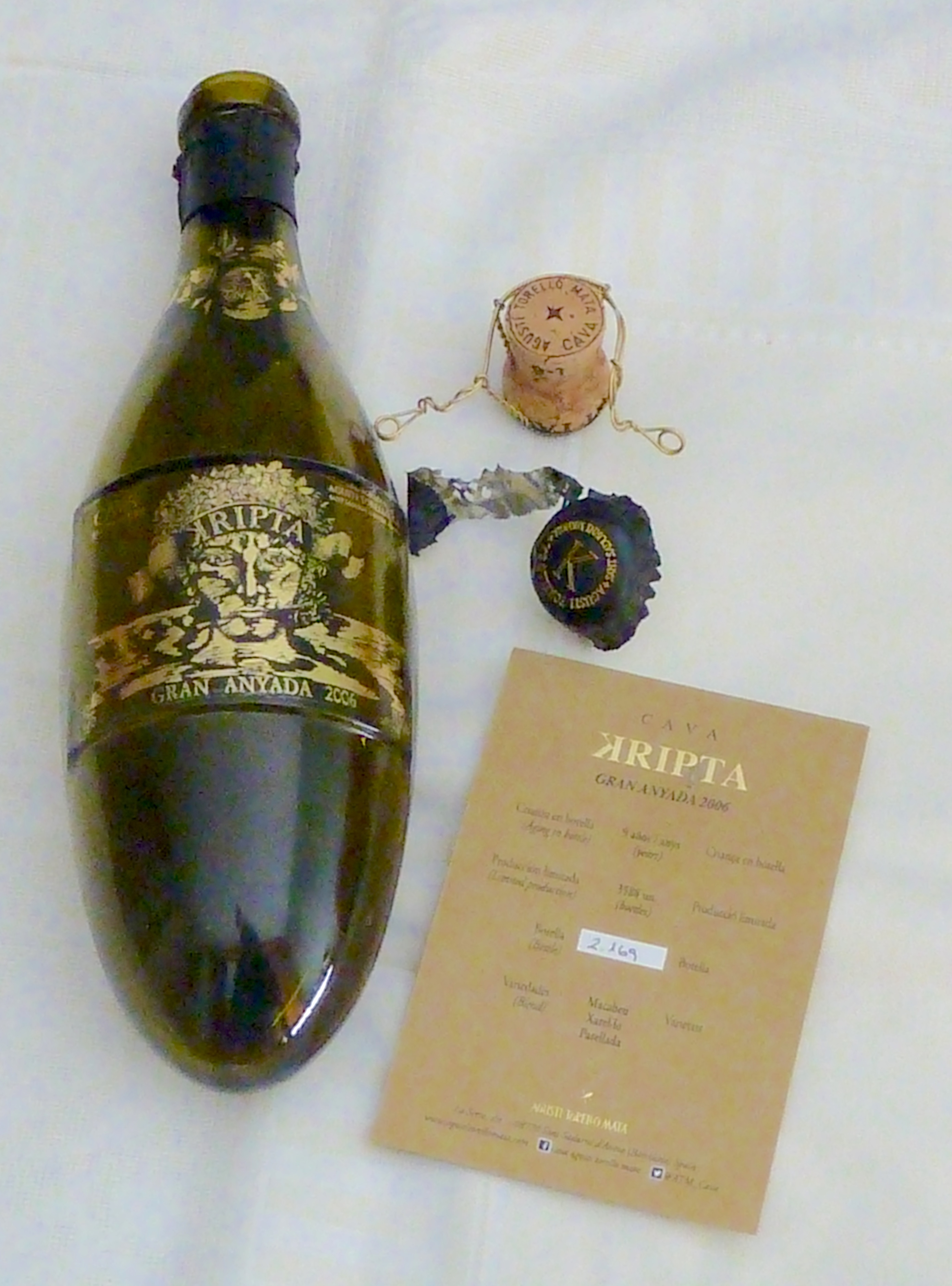 Kripta Cava Gran Anyada 2006